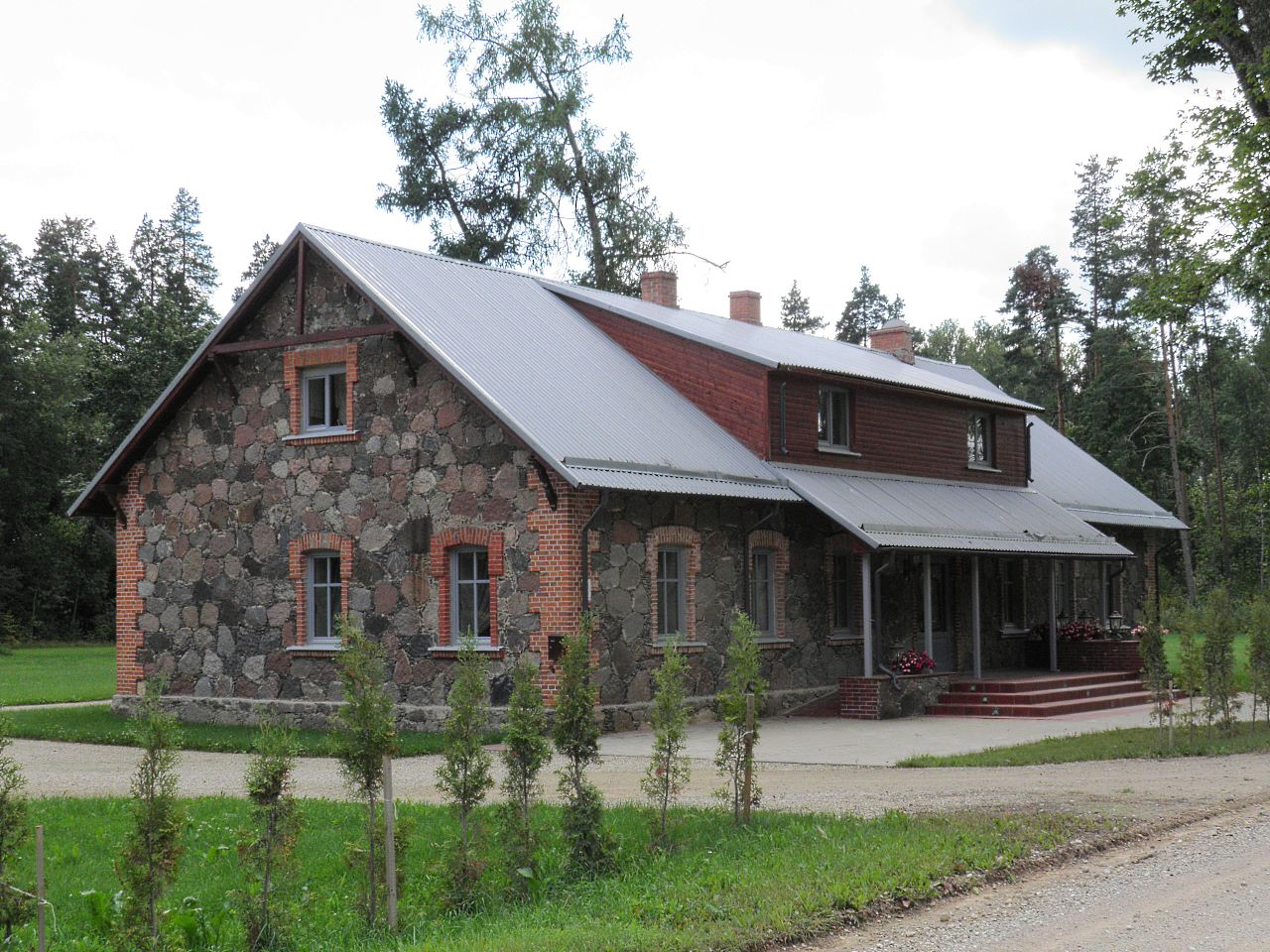 Brīvdienu māja "Susēja" (1)